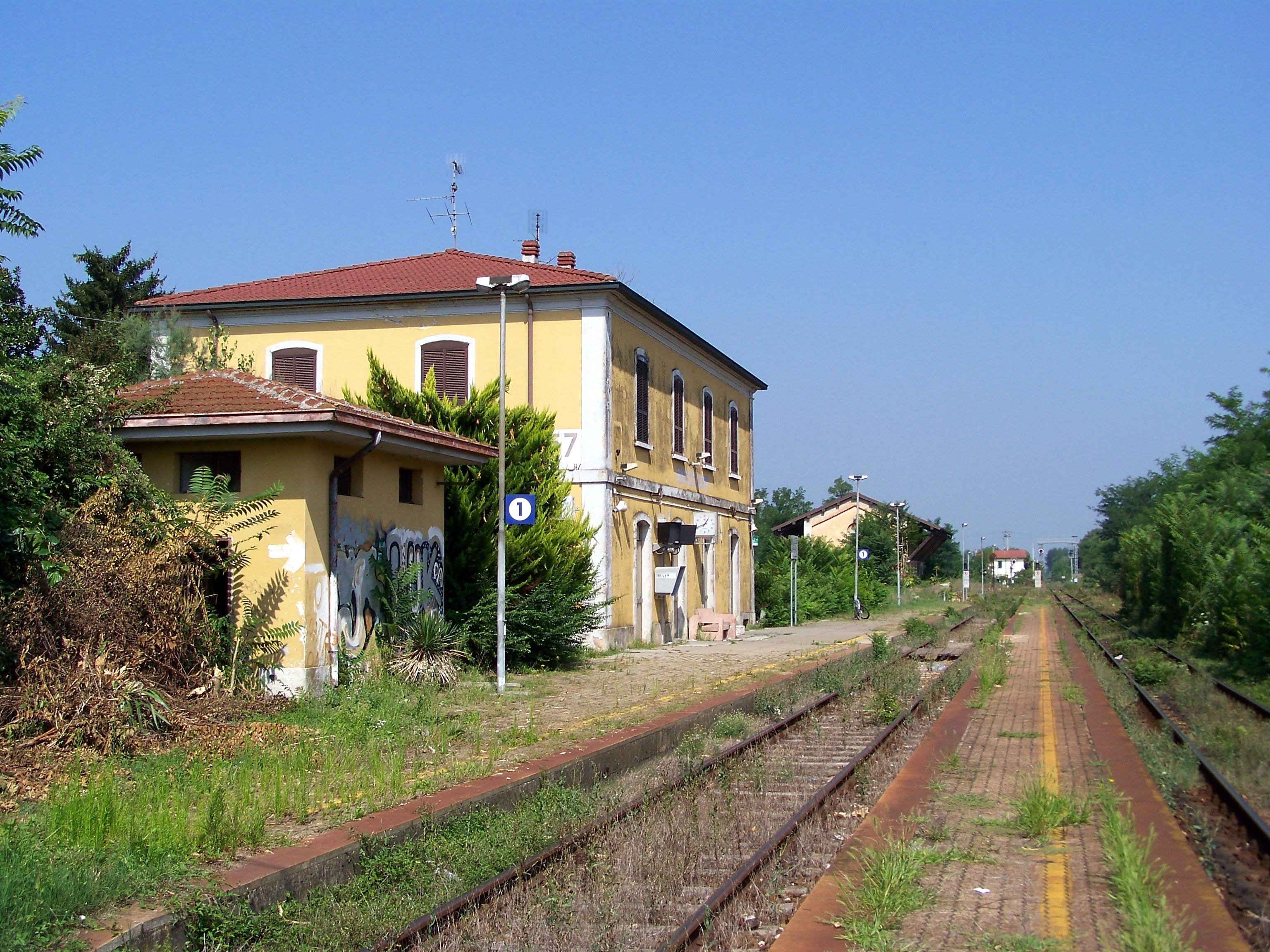 Edifici e piano binari della stazione di Remedello Sopra.